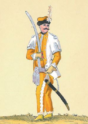 61. Pułkownik Baranowski szef 5 Pułku Ułanów ( oficer pułku 5 PS (własciwie Baranowski był komendantem 1 pułku PS